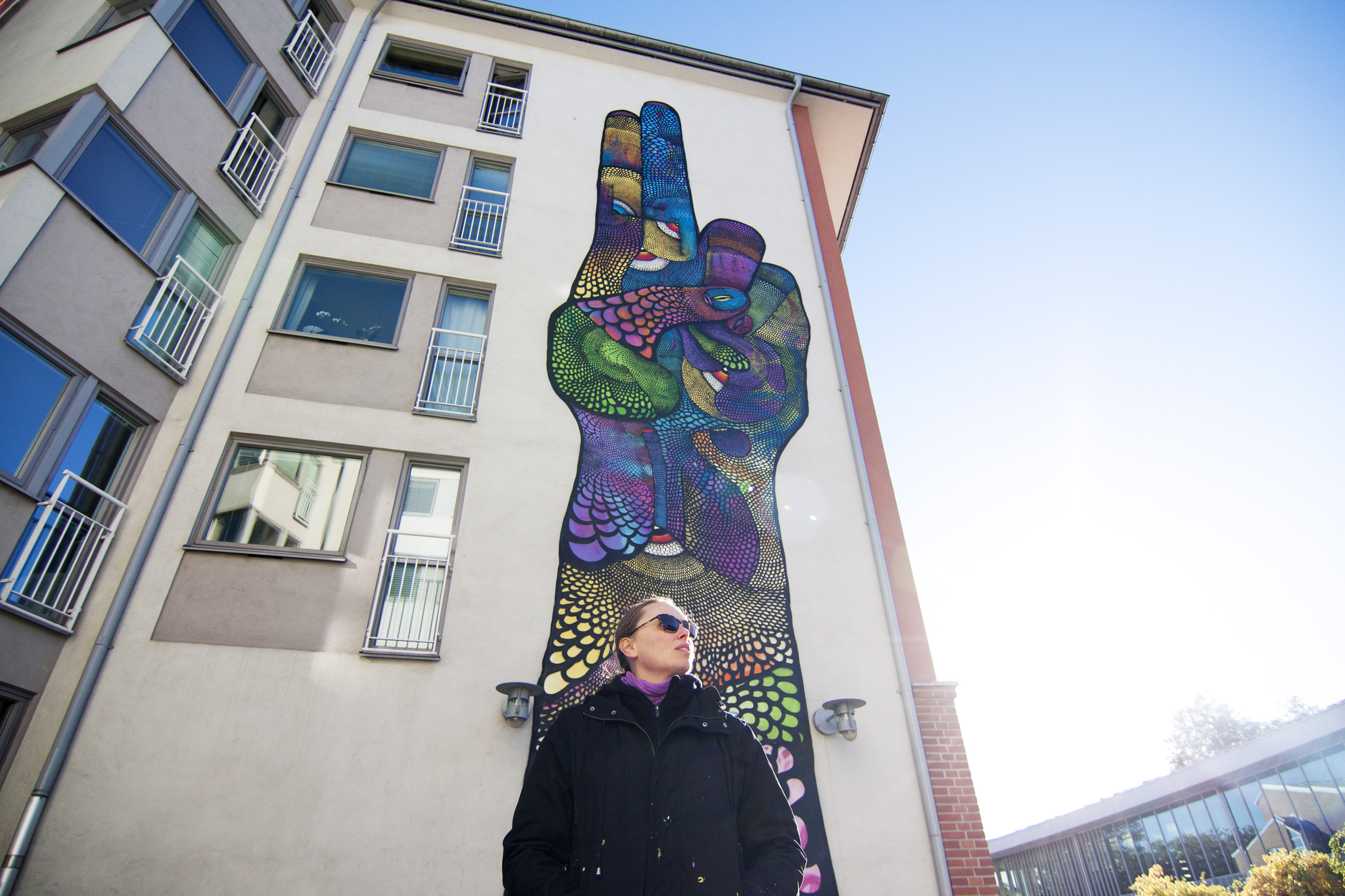 Målningen Pi av Carolina Falkholt på HFAB:s studentbostadshus Jakten vid Stadsbiblioteket i Halmstad.